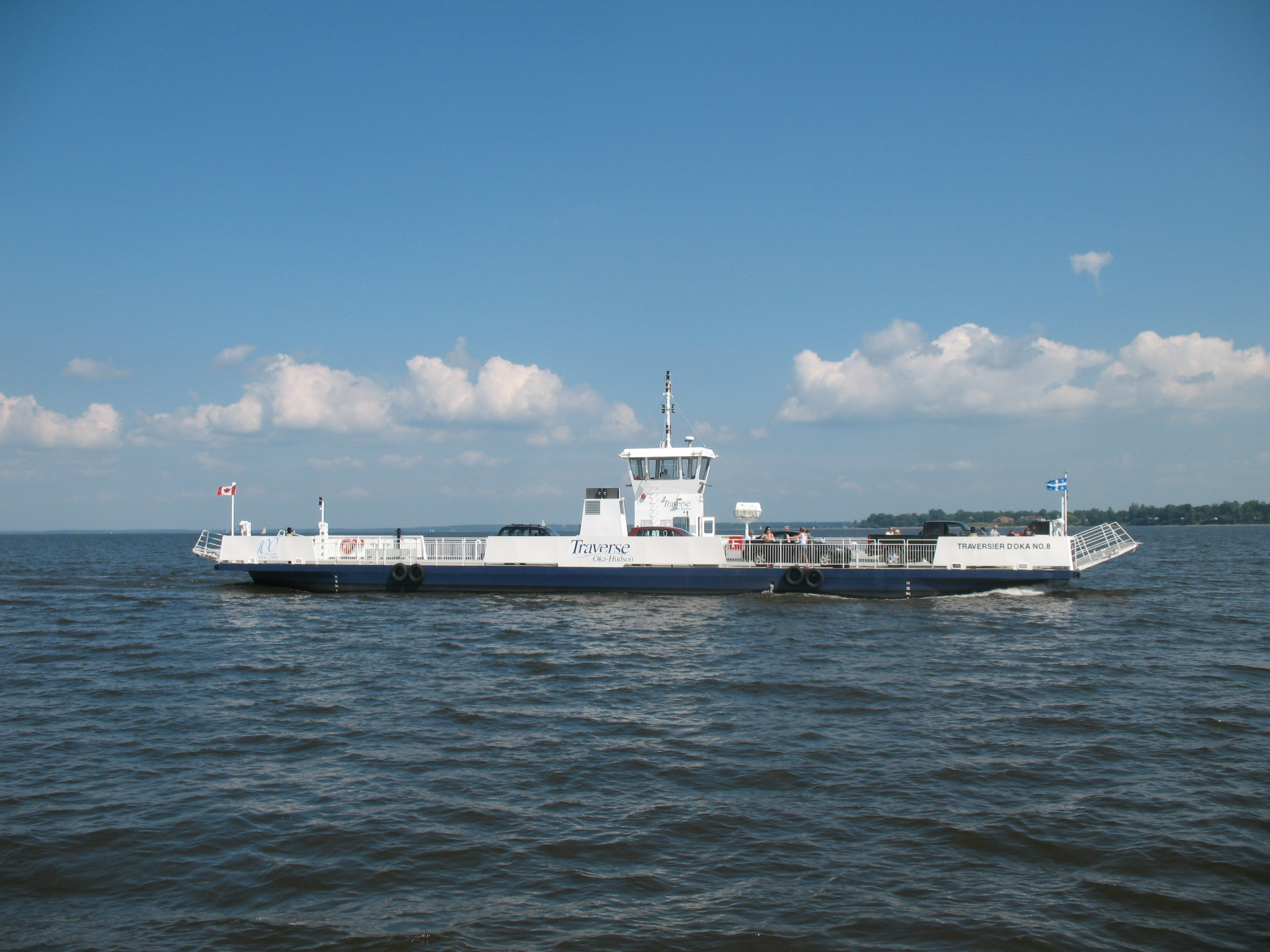 Fähre über den Ottawa auf dem Weg von Oka nach Salahberry-de-Valleyfield, Provinz Québec, Kanada